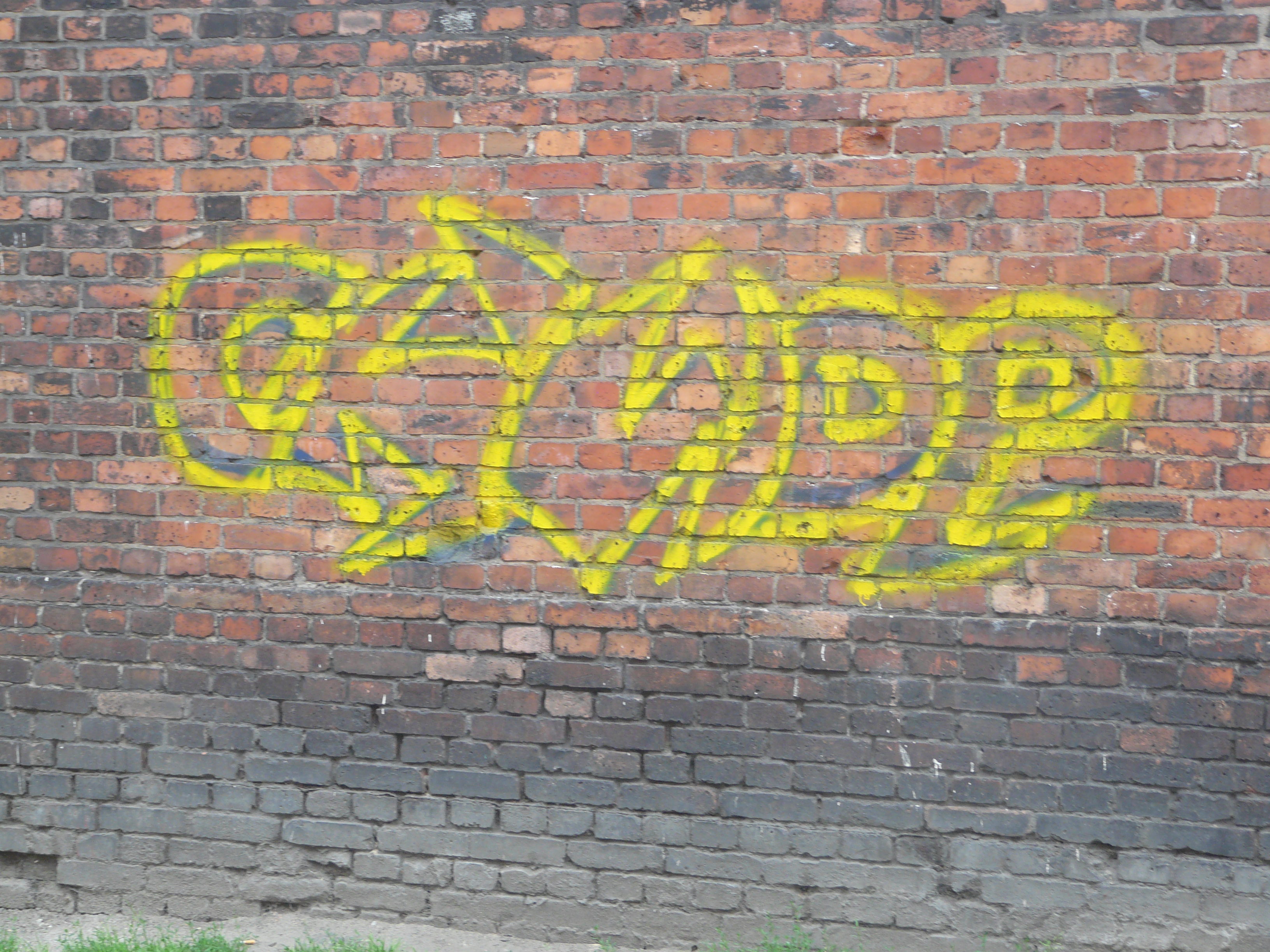 Janów-Nikiszowiec, Katowice